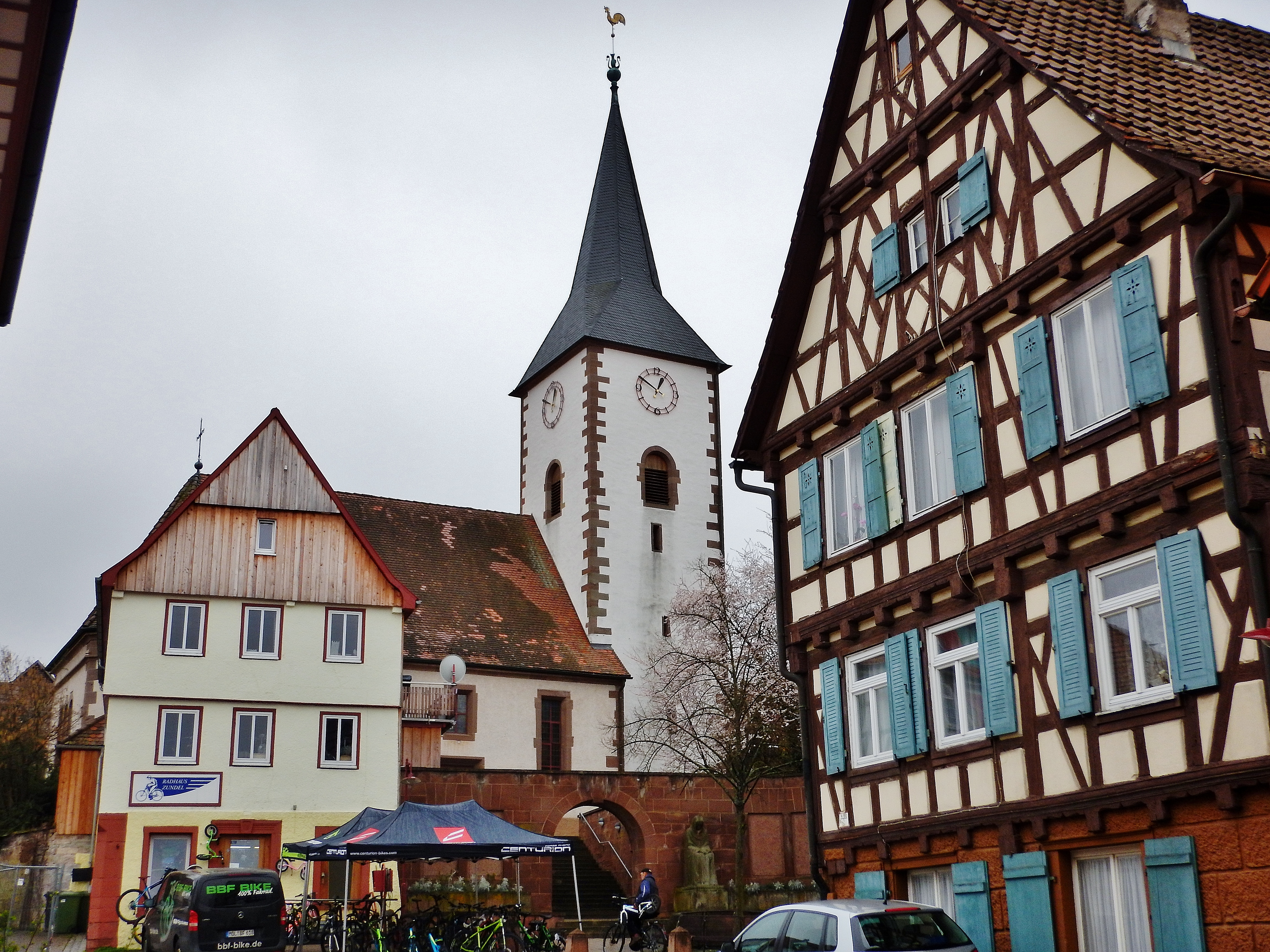 Hindenburgstraße in Wiernsheim mit Mauritiuskirche